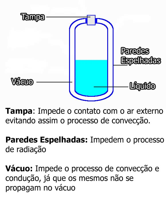 Vaso de Dewar, evita convecÃ§Ã£o, radiaÃ§Ã£o e conduÃ§Ã£o